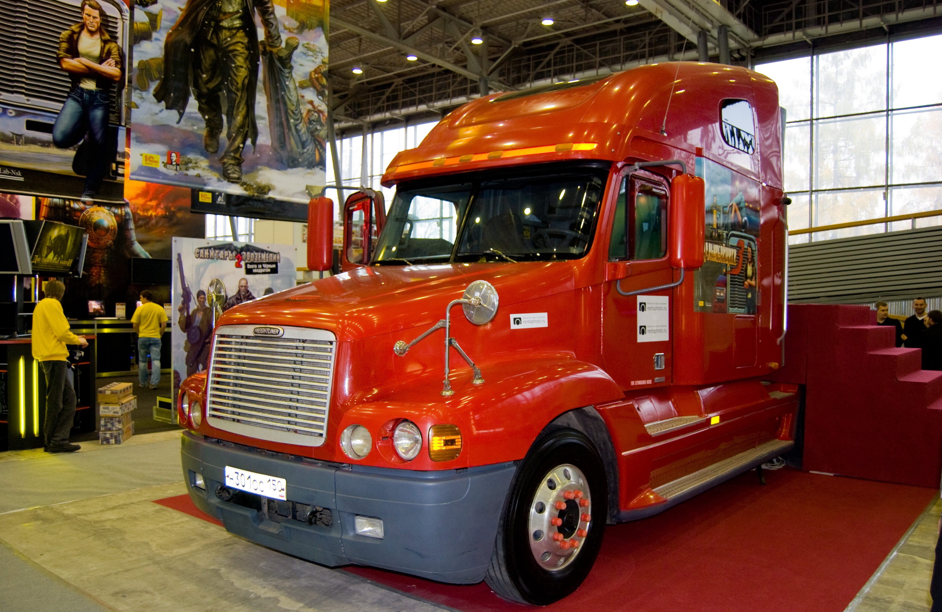 Igromir 2008